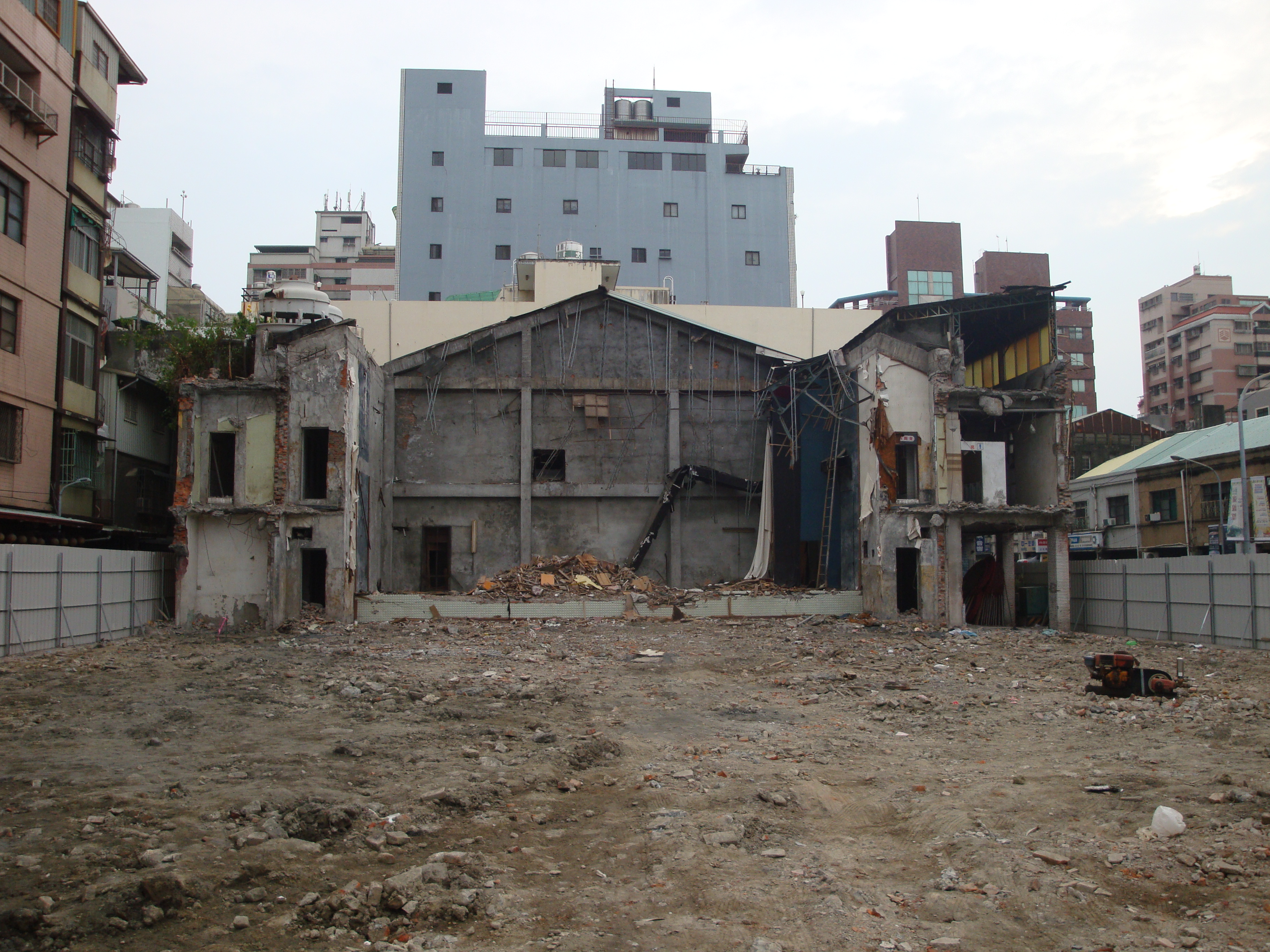 中文（台灣）: 大舞台戲院現況